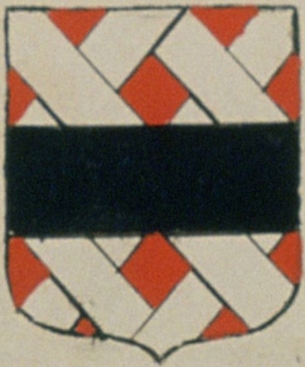 Hozier, Charles-René d': Volumes relies du Cabinet des titres 405 : Armorial général de France, dressé, en vertu de l'édit de 1696. Tome III, Cotté B, Béarn, Gnalité de Pau 1697-1709